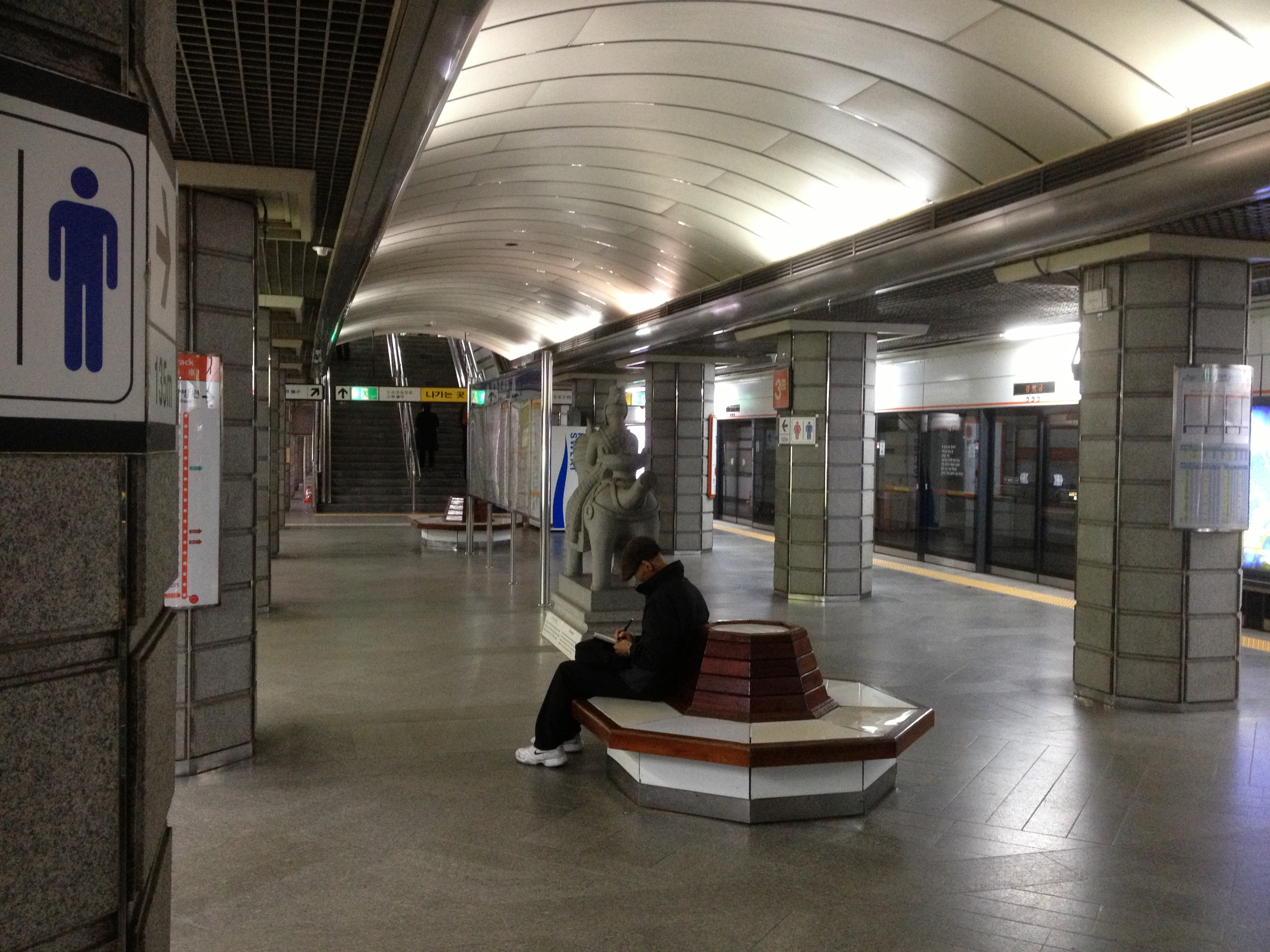 경복궁역 승강장